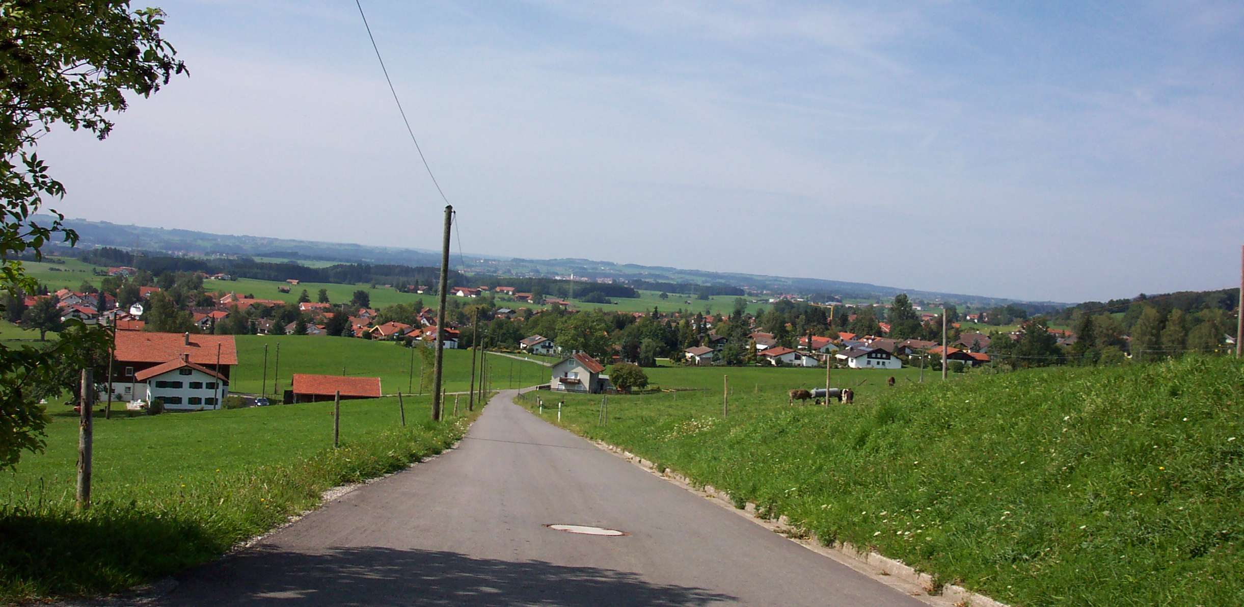 Aussicht über das Allgäu von Fleschützen aus